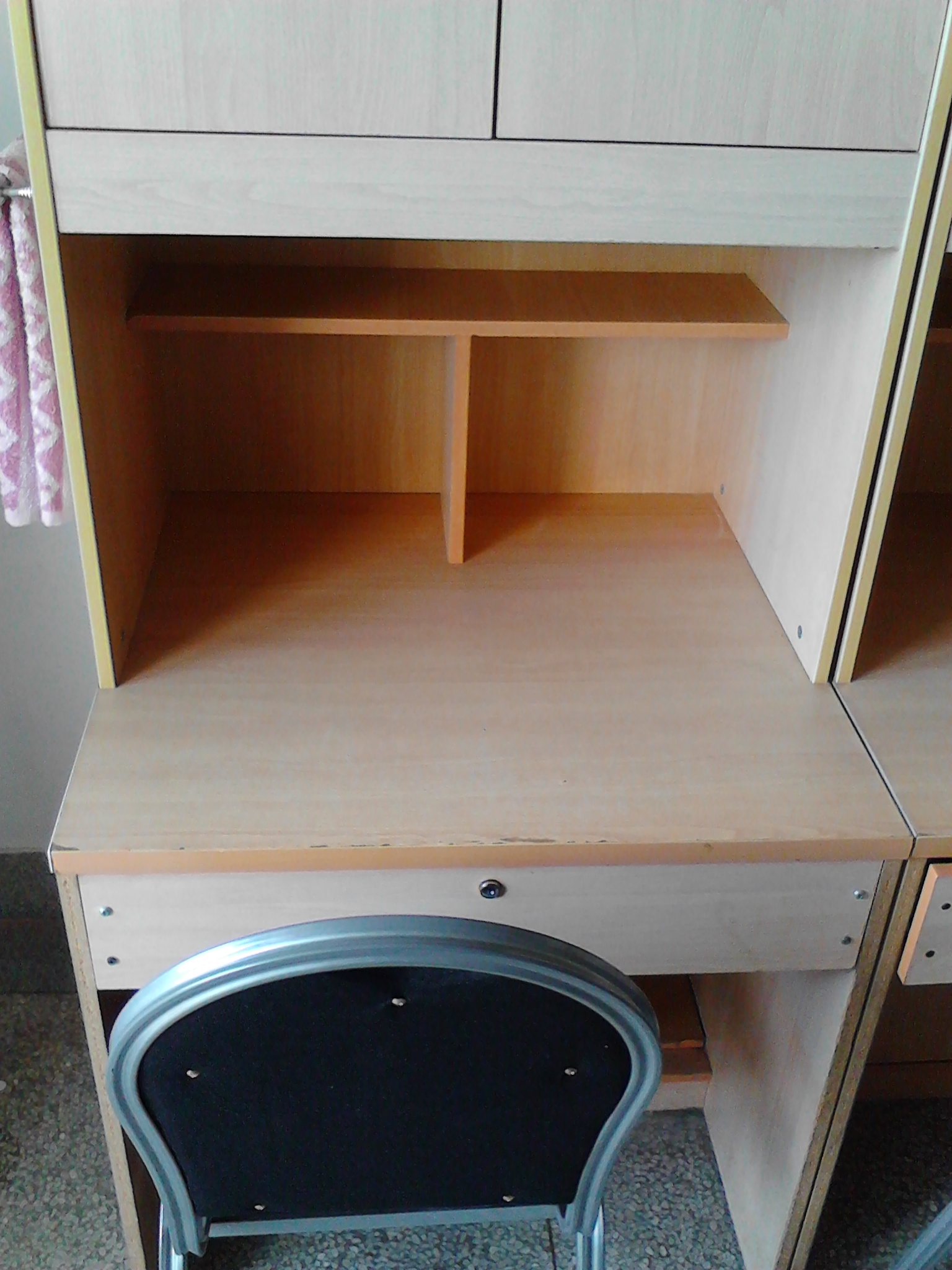 摄于三号寝室楼，此为一个学生的书桌。书桌上方为衣橱。